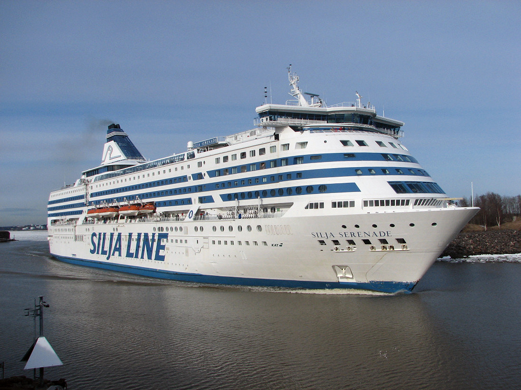 M/S Silja Serenade leaving from Helsinki. Photo by Antti Havukainen